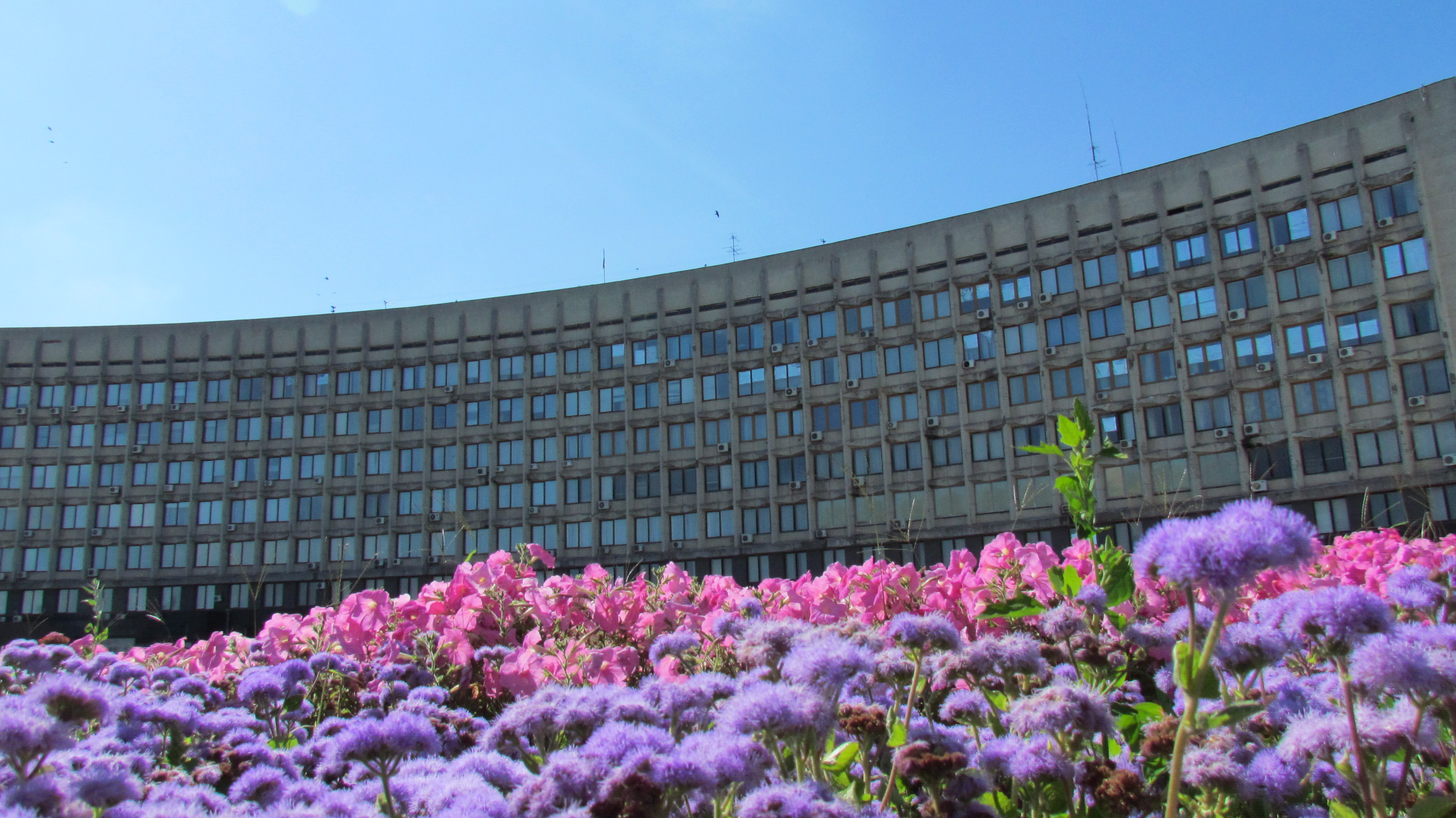 Майдан Незалежності. Суми. 2015